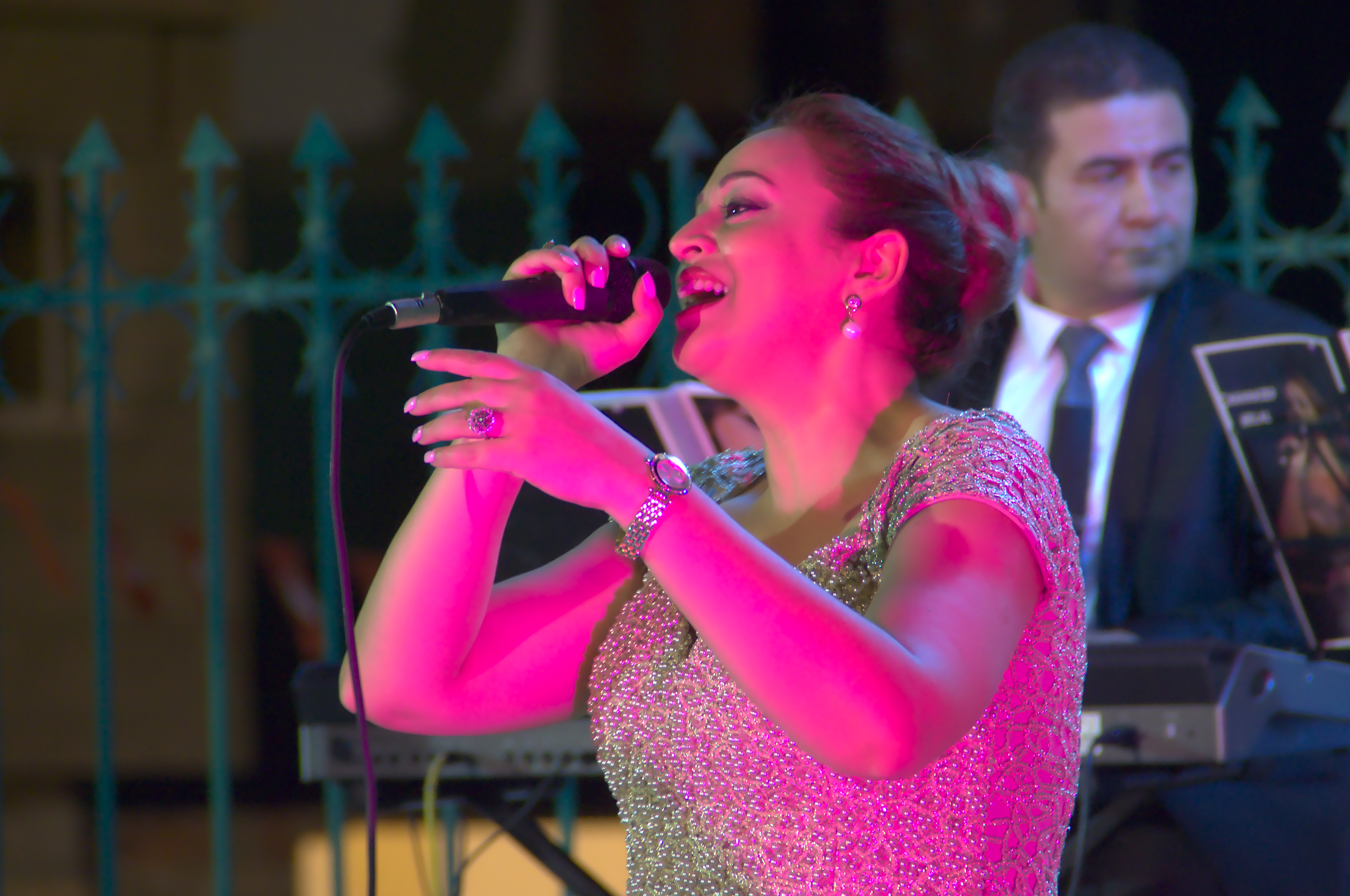 Chahrazed Helal, au festival de la médina de Sayada